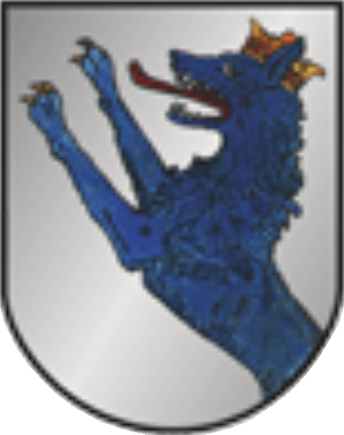 Kaiser Ferdinand I. verlieh am 19.Januar 1552 ein neues Wappen. Gnas war in der ersten Hälfte des 16. Jhds. im Besitze des in der männlichen Linie ausgestorbenen Geschlechtes der Reichenburger. Diese führten einen blauen Wolf im Schild. Den Gnasern wurde das verminderte Wappen dieses Geschlechtes verliehen.